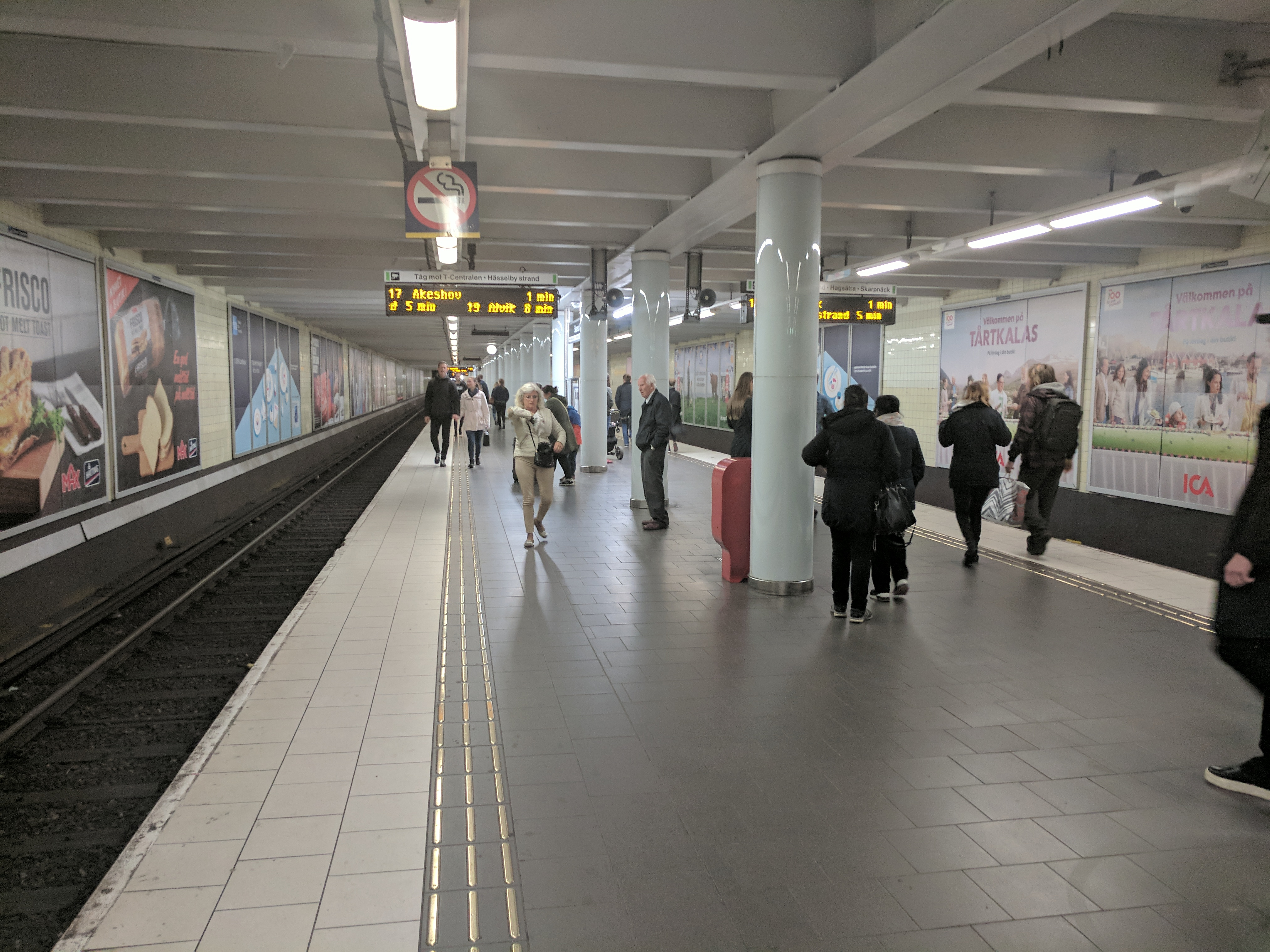 Skanstull 20170923